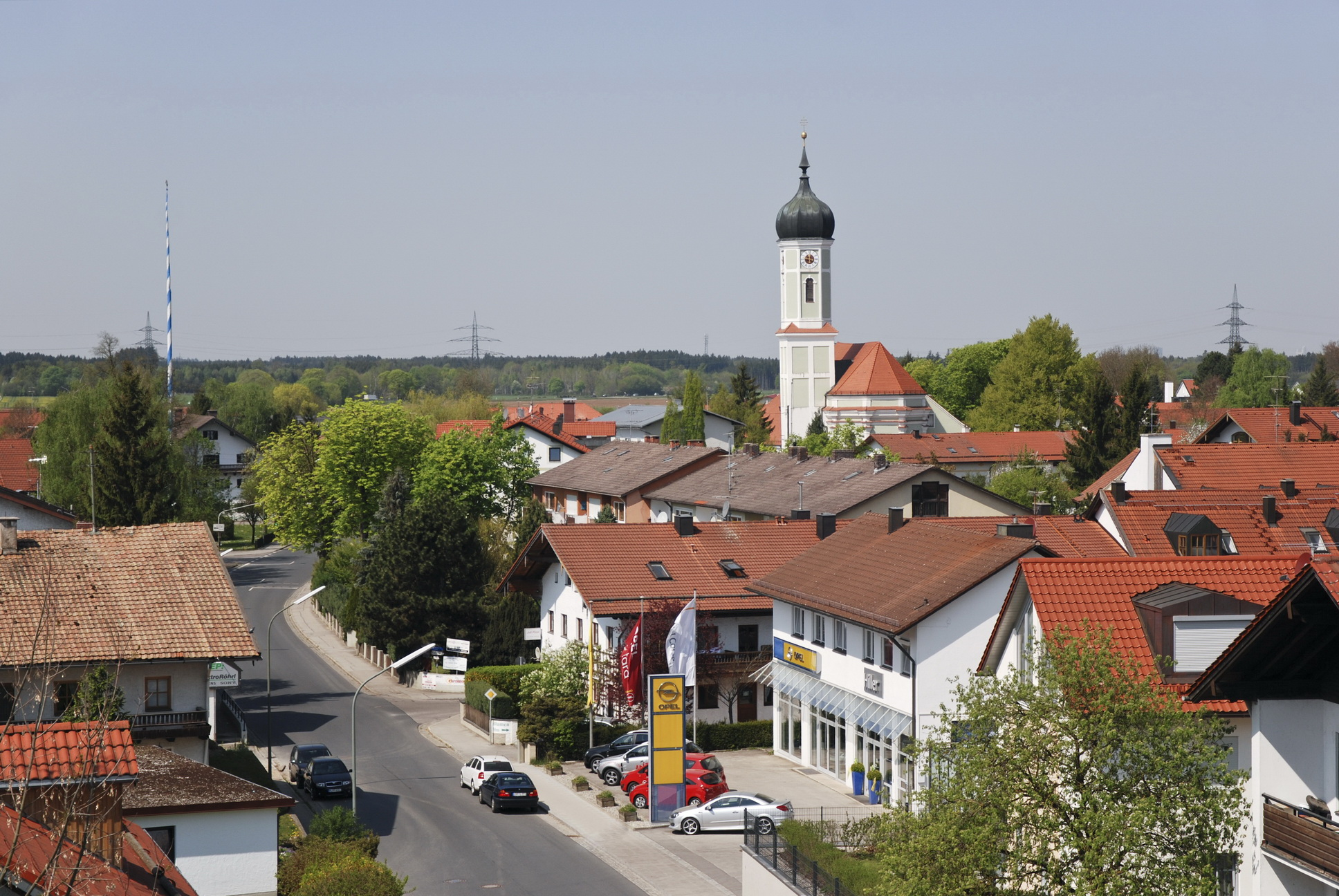 Ortbild von Zorneding mit Maibaum und Kirche.